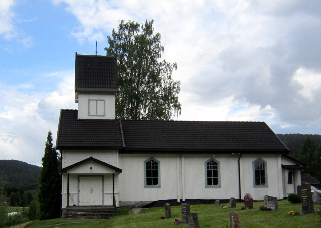 Solumsmoen kapell